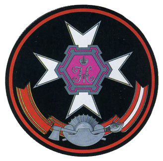 Нарукавная нашивка